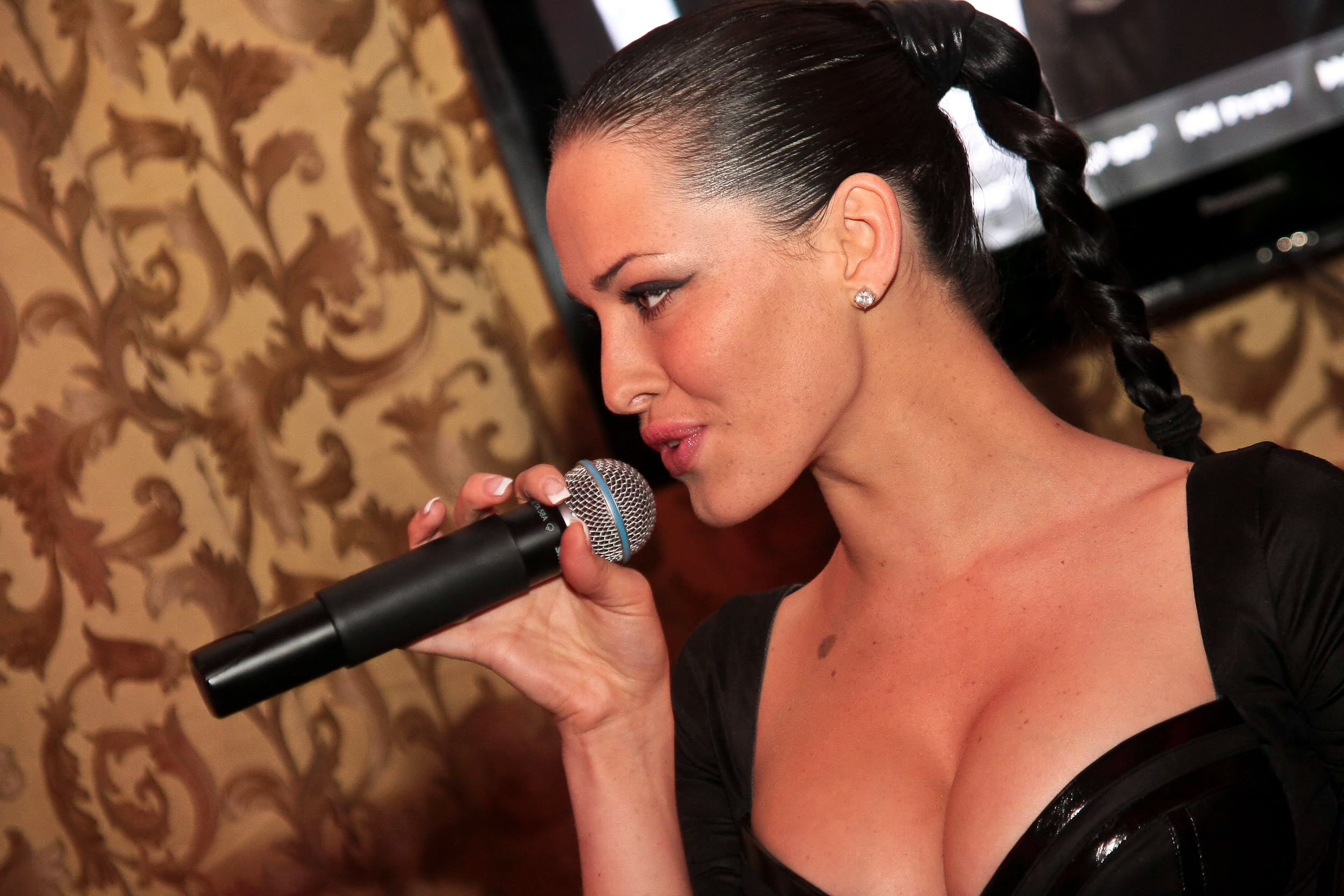 Дарья Астафьева исполняет песни на приватной вечеринке